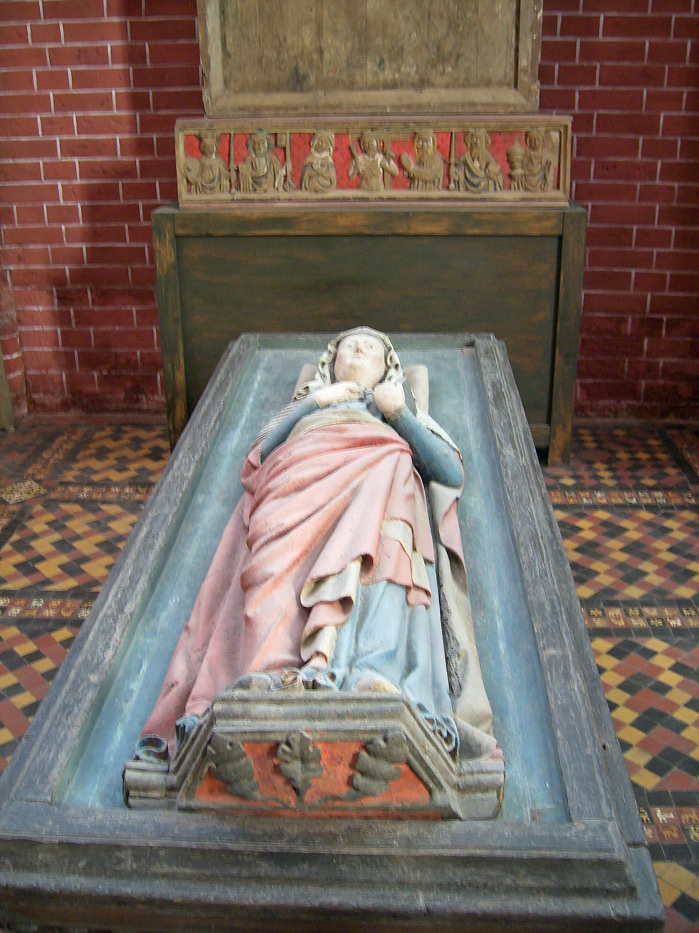 Bad Doberan: Münster - Grabmal von Margarete von Dänemark